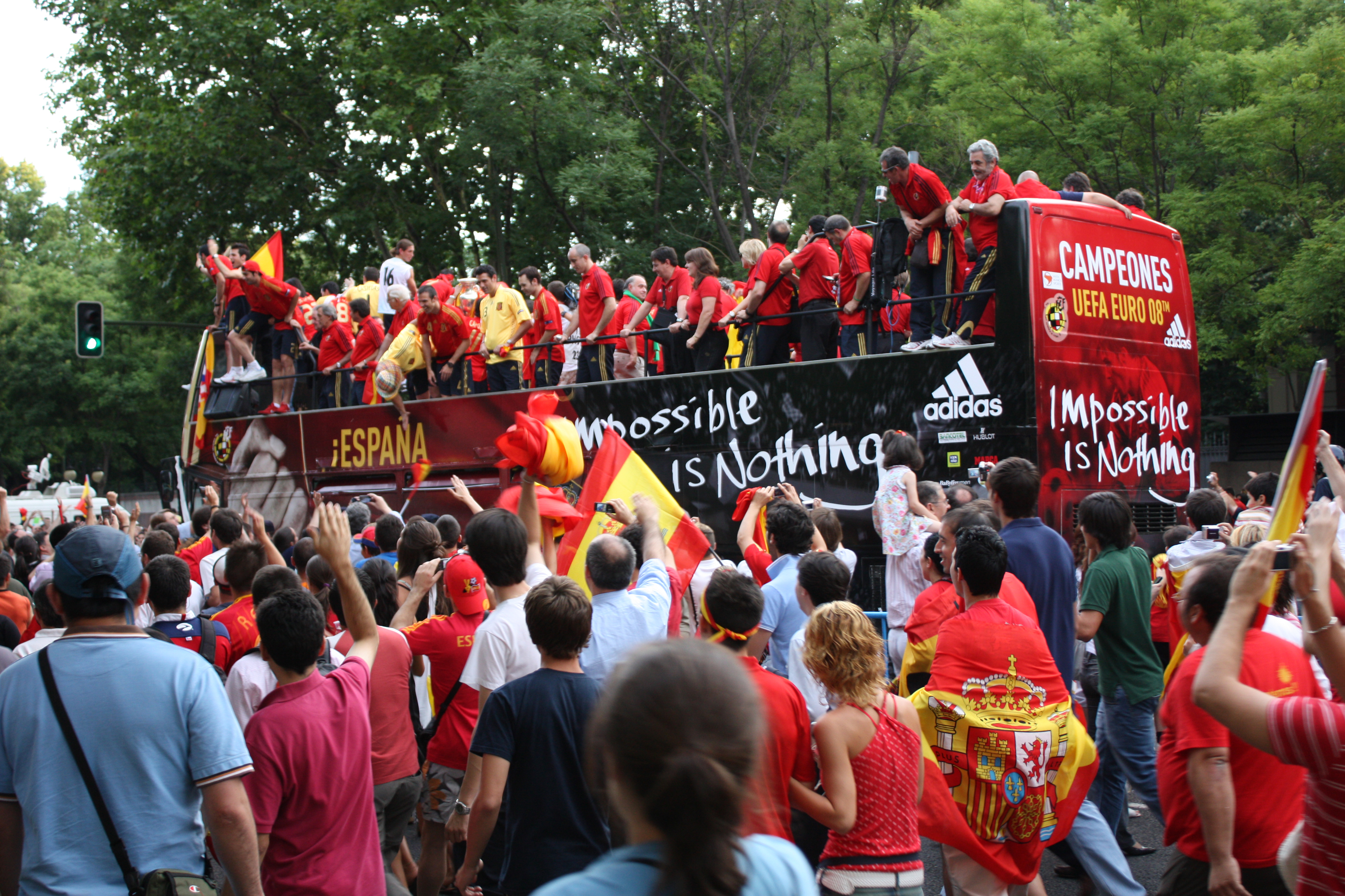 La Selección nacional de fútbol de España Celebra en Madrid la Eurocopa 2008.